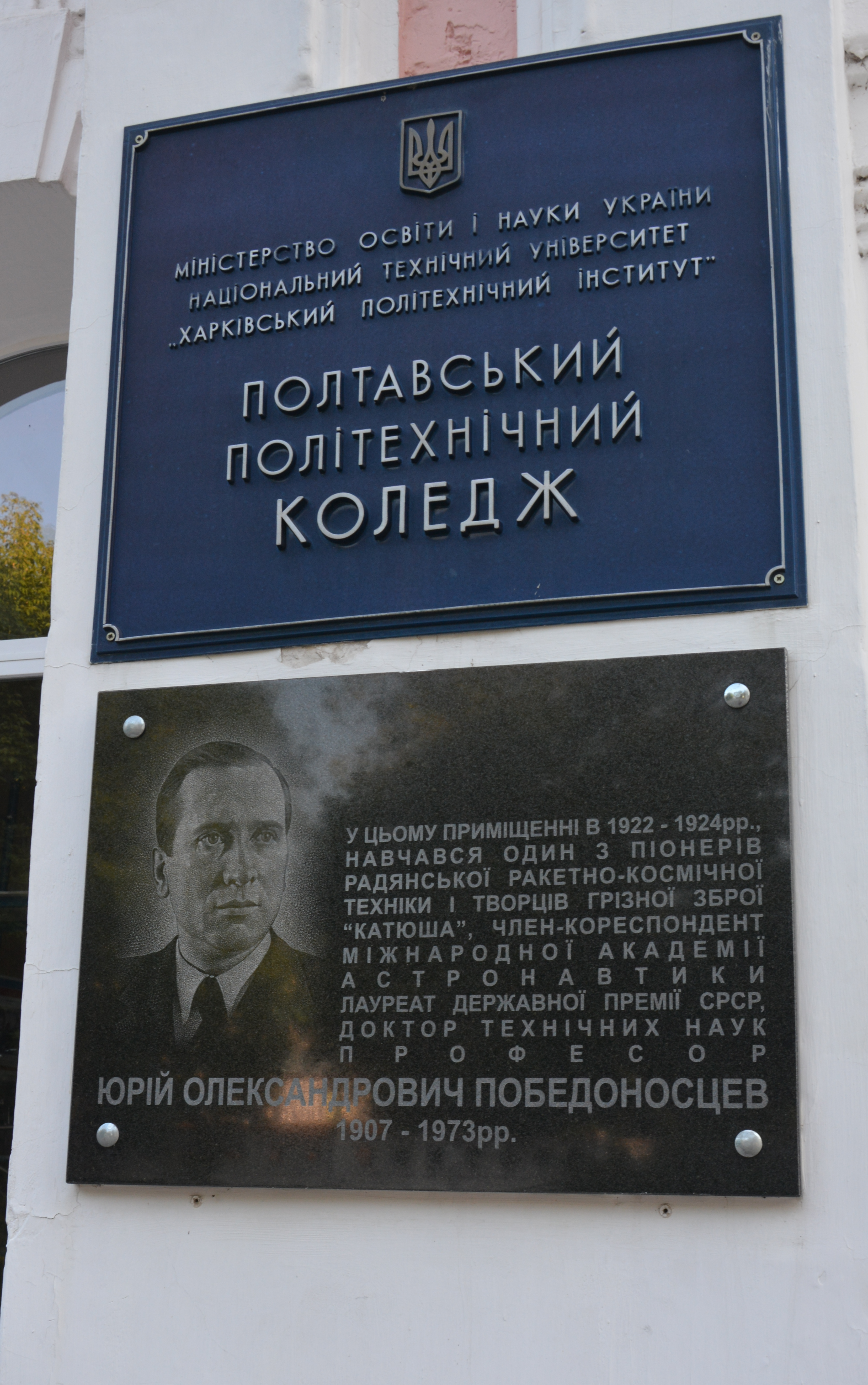 Меморіальна дошка на будинку колишньої індустріально-технічної школи, де у 1922-1924 рр. навчався Ю.О.Побєдоносцев, один із піонерів радянської ракетно-космічної техніки, Полтава, вул. Пушкіна, 83А